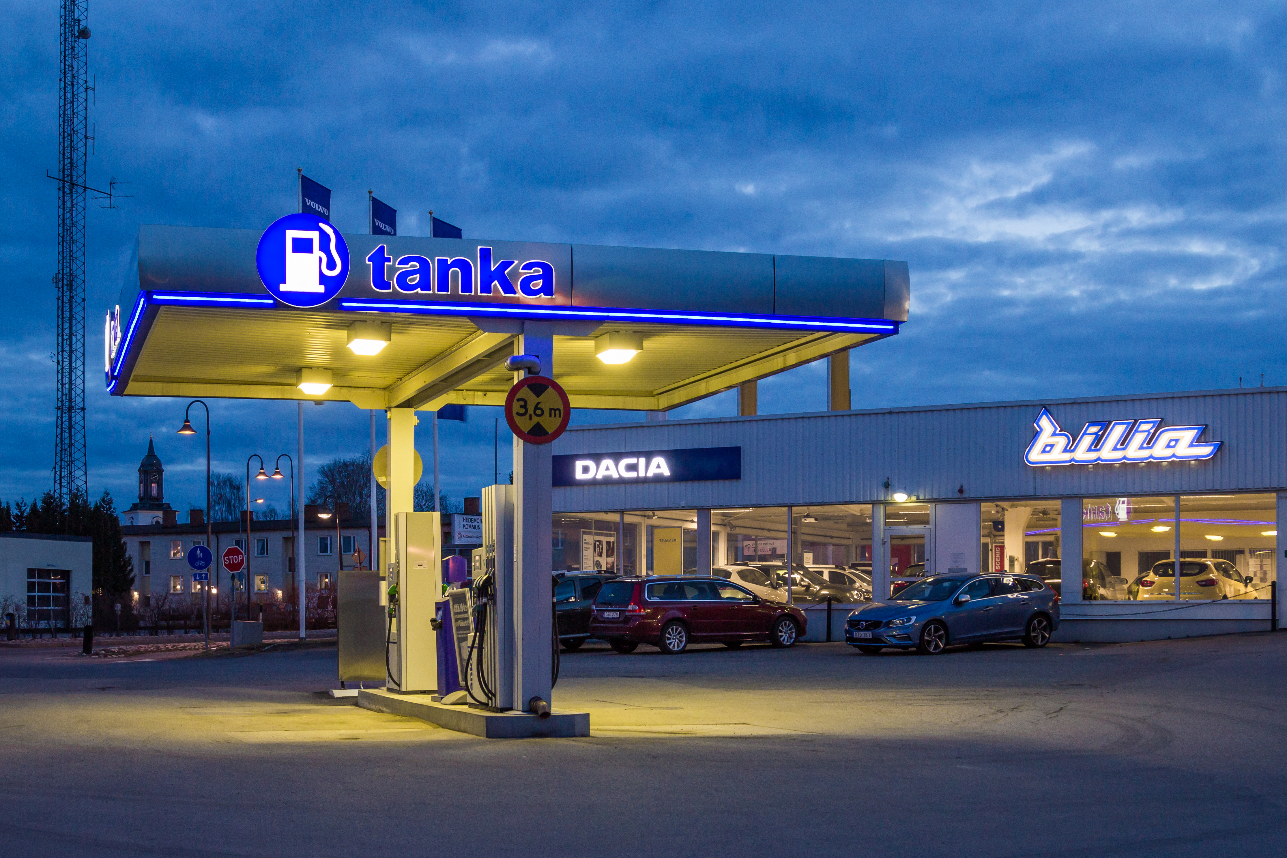 Bensinstationen Tanka (f.d. Q8) och personbilsåterförsäljaren Bilia (f.d. Rolf Ericson Bil), i Hedemora, Dalarnas län, Sverige.